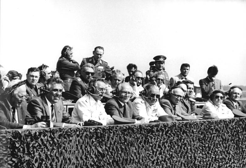 DDR, NVA-Truppenbesuch, Honecker ADN-ZB Mittelstädt 29.8.85 DDR: Truppenbesuch- Der Generalsekretär des ZK der SED und Vorsitzender des Staatsrates der DDR, Erich Honecker, Vorsitzender des Nationalen Verteidigungsrates, auf der Ehrentribüne während der Vorführung moderner Kampftechnik im JG-1 "Fritz Schmenkel". Auf der Tribüne vlnr: Die Mitglieder des Politbüros des ZK der SED Werner Felfe und Egon Krenz, Generaloberst Wolfgang Reinhold, Erich Honecker, die Mitglieder des Politbüros des ZK der SED, Armeegeneral Heinz Hoffmann (Minister für Nationale Verteidigung), Horst Sindermann, Präsident der Volkskammer, Armeegeneral Erich Mielke (Minister für Staatssicherheit) Günter Mittag.